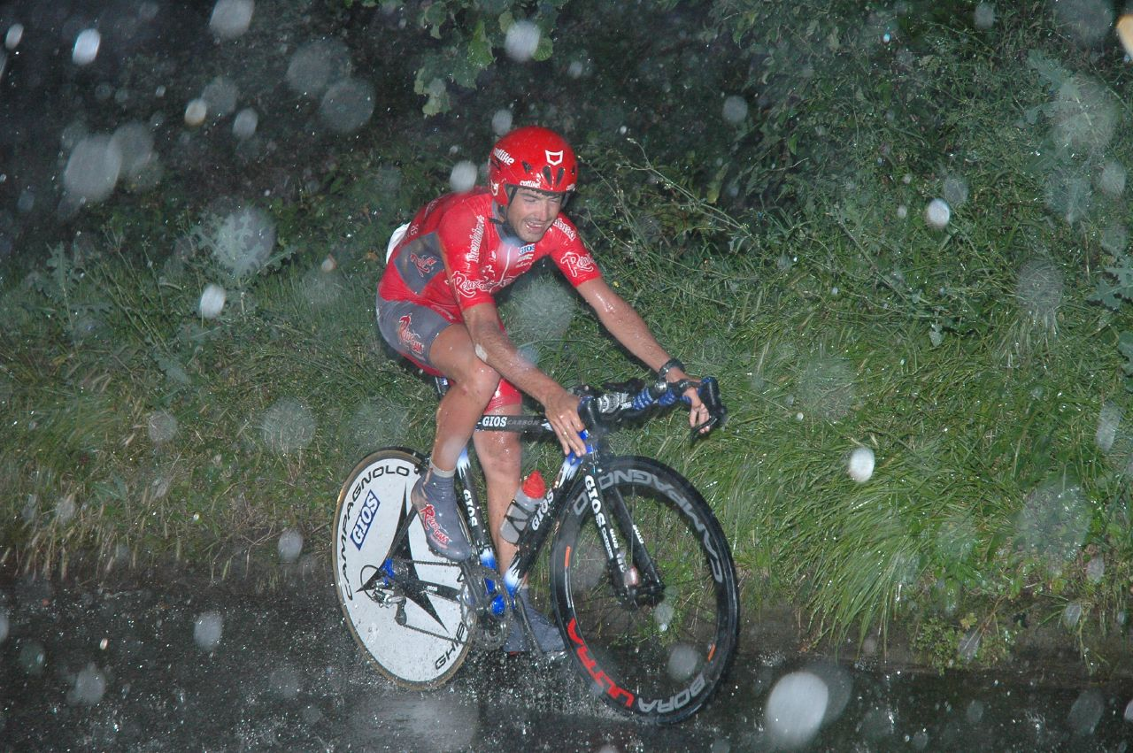 Francisco Mancebo, Euskal Bizikleta 2007